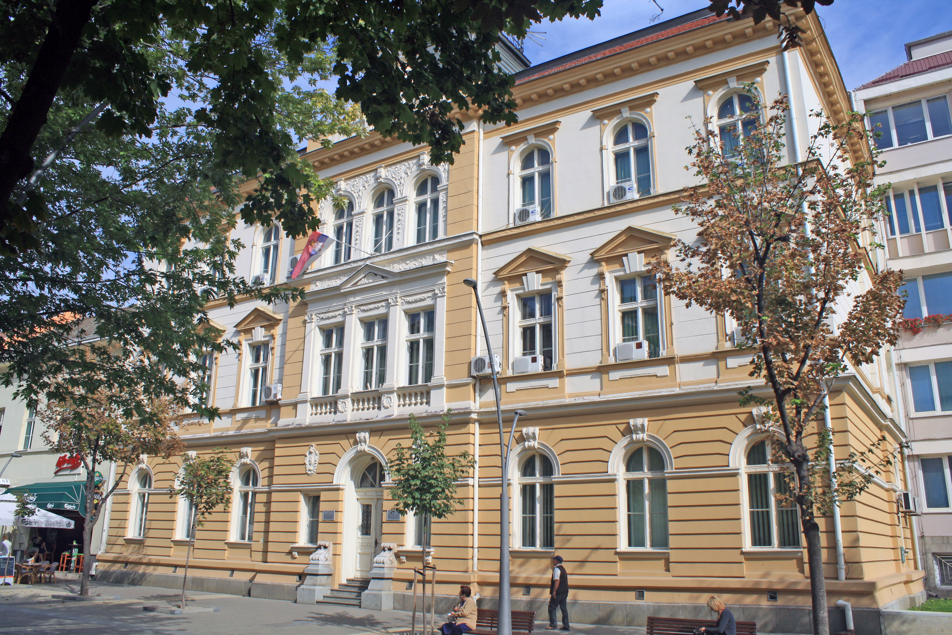 Зграда Окружног суда у Шапцу, улица Господар Јевремова број 4.